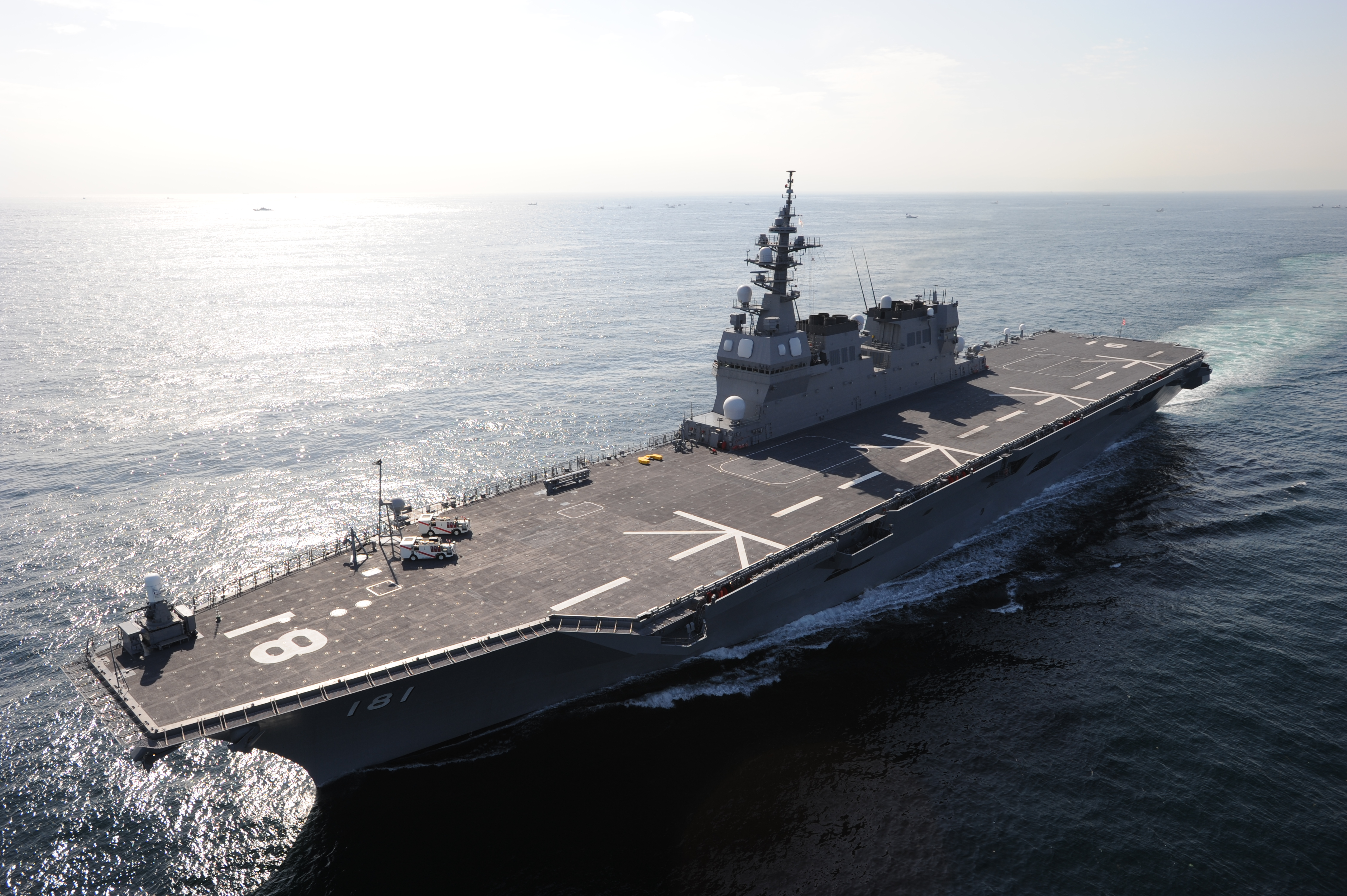 DDH-181 ひゅうが